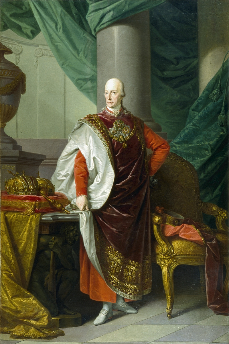 Porträt Kaiser Franz I. von Österreich undatiert Öl auf Leinwand Oberösterreichischetitle QS:P1476,de:"Porträt Kaiser Franz I. von Österreich undatiert Öl auf Leinwand Oberösterreichische" label QS:Lde,"Porträt Kaiser Franz I. von Österreich undatiert Öl auf Leinwand Oberösterreichische"